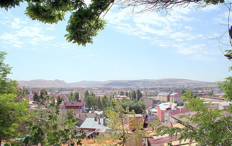 Sivas, Turkey